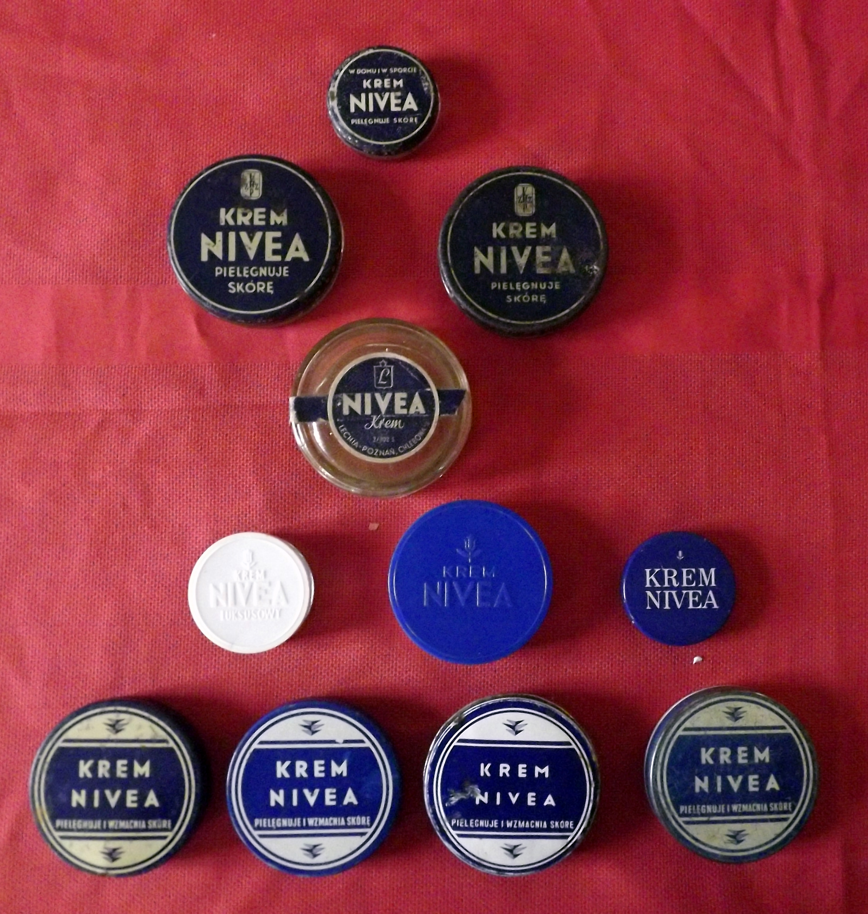 Pudełka kremu NIVEA z lat 1945-1990